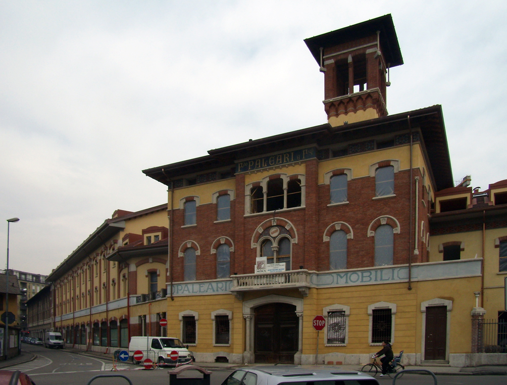 Lissone, il mobilificio Paleari.